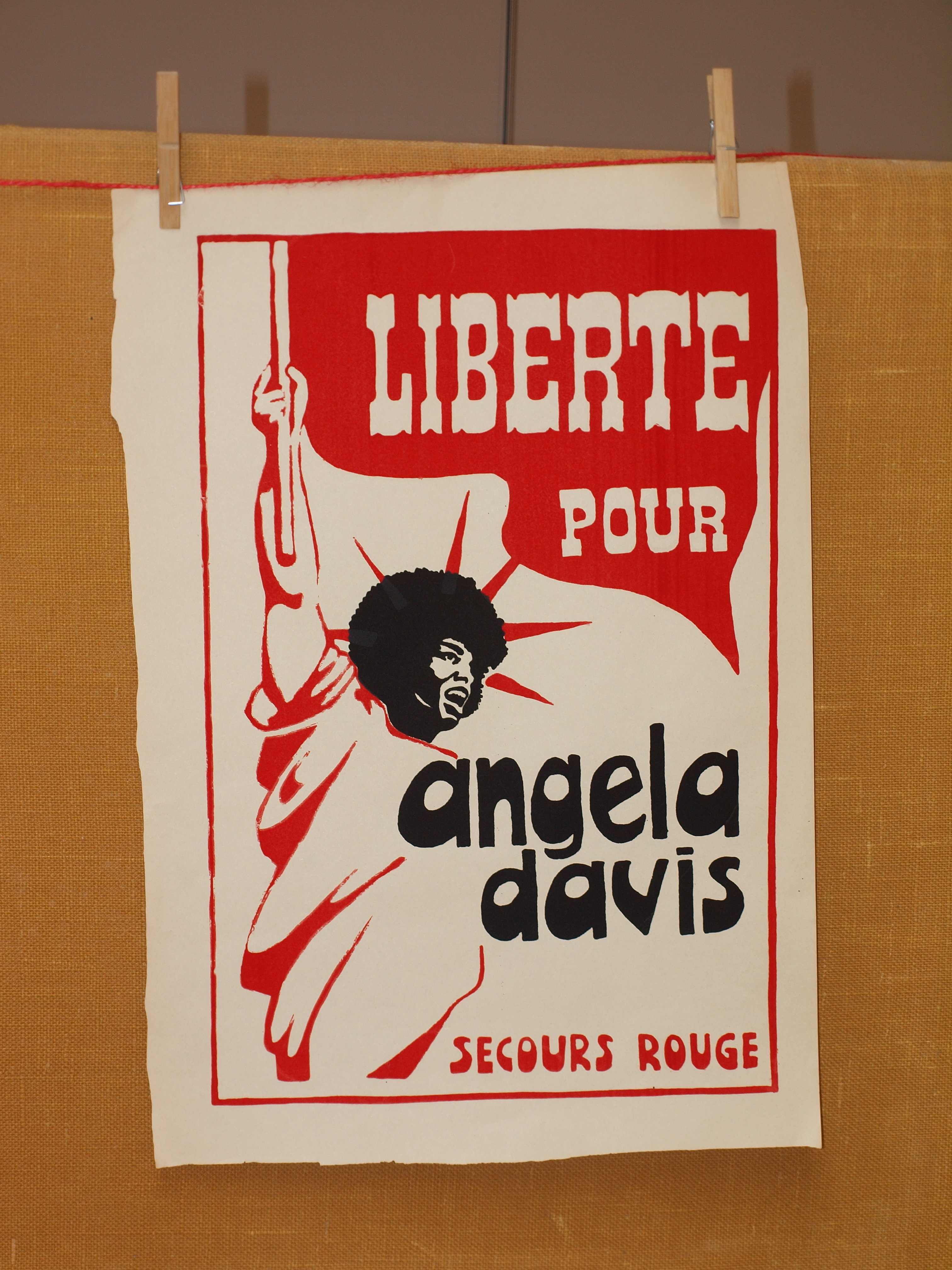 Exposition Mai 68 et la suite..., à Villeneuve-la-Guyard (Yonne, France) , du 22 au 29 mai 2018